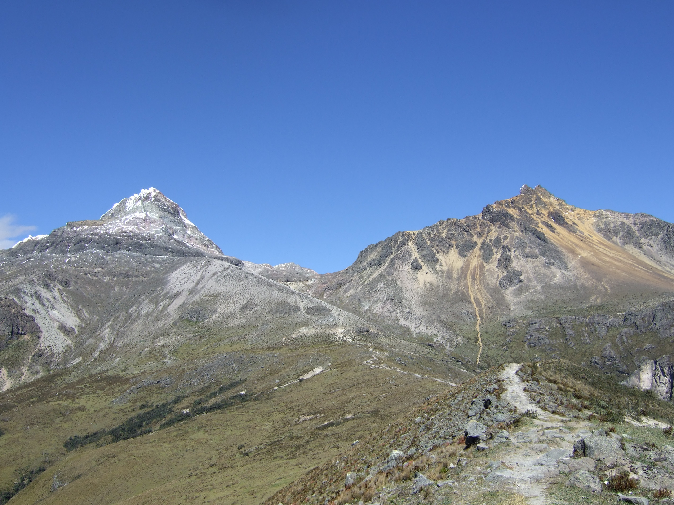 Iliniza Sur and Iliniza Norte, Ecuador